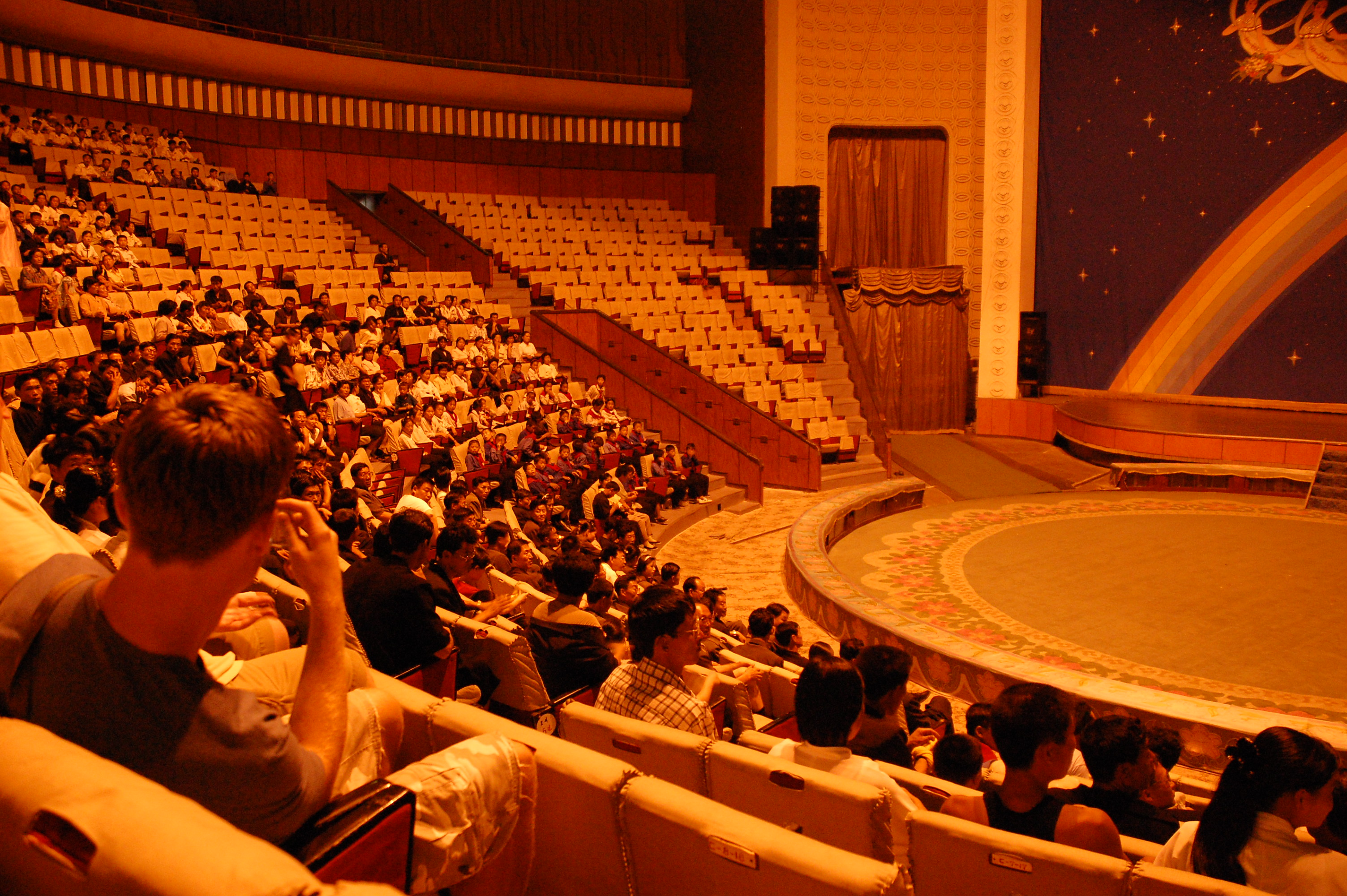 North Korea — Pyongyang Circus